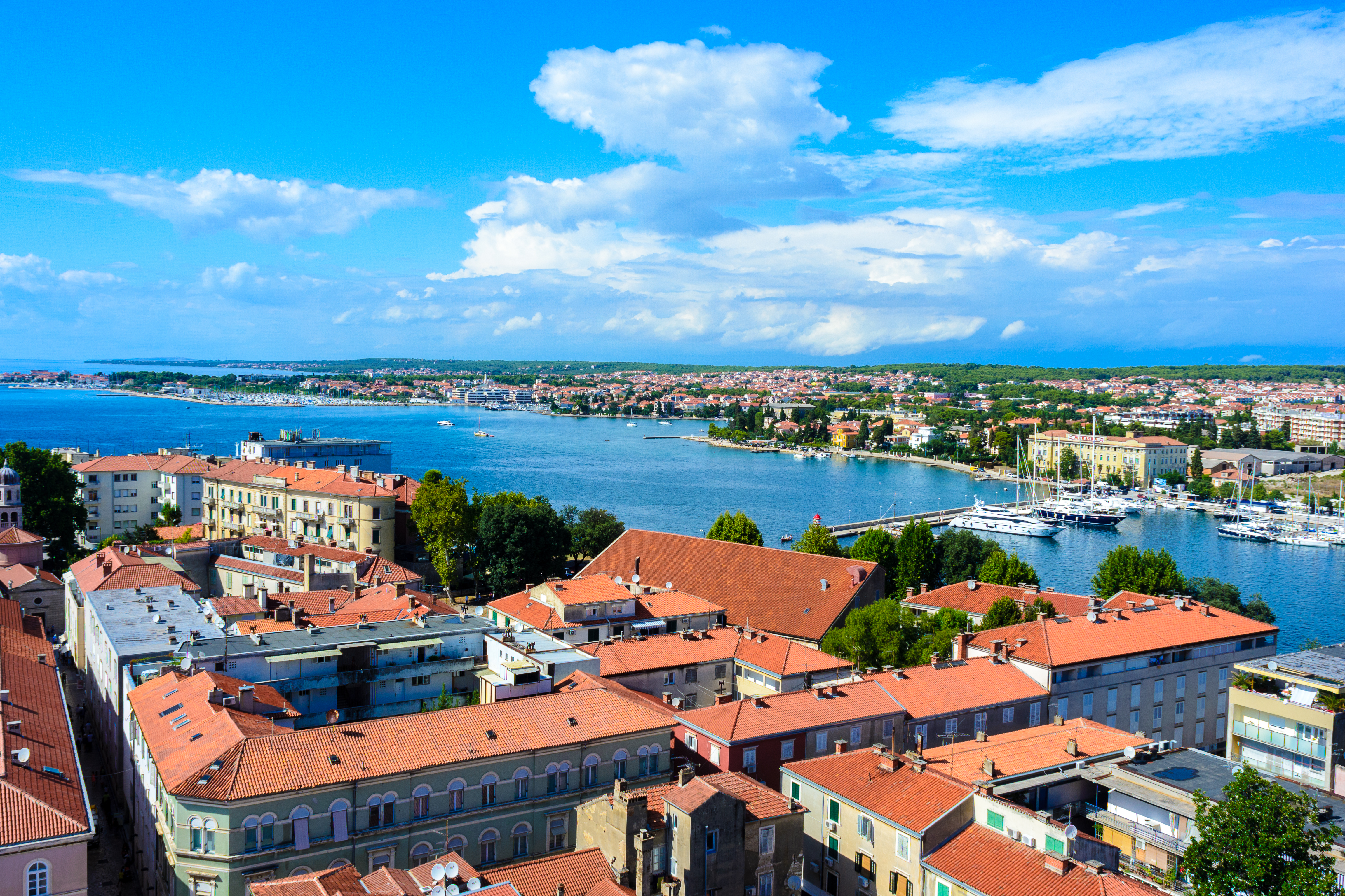 Zadar